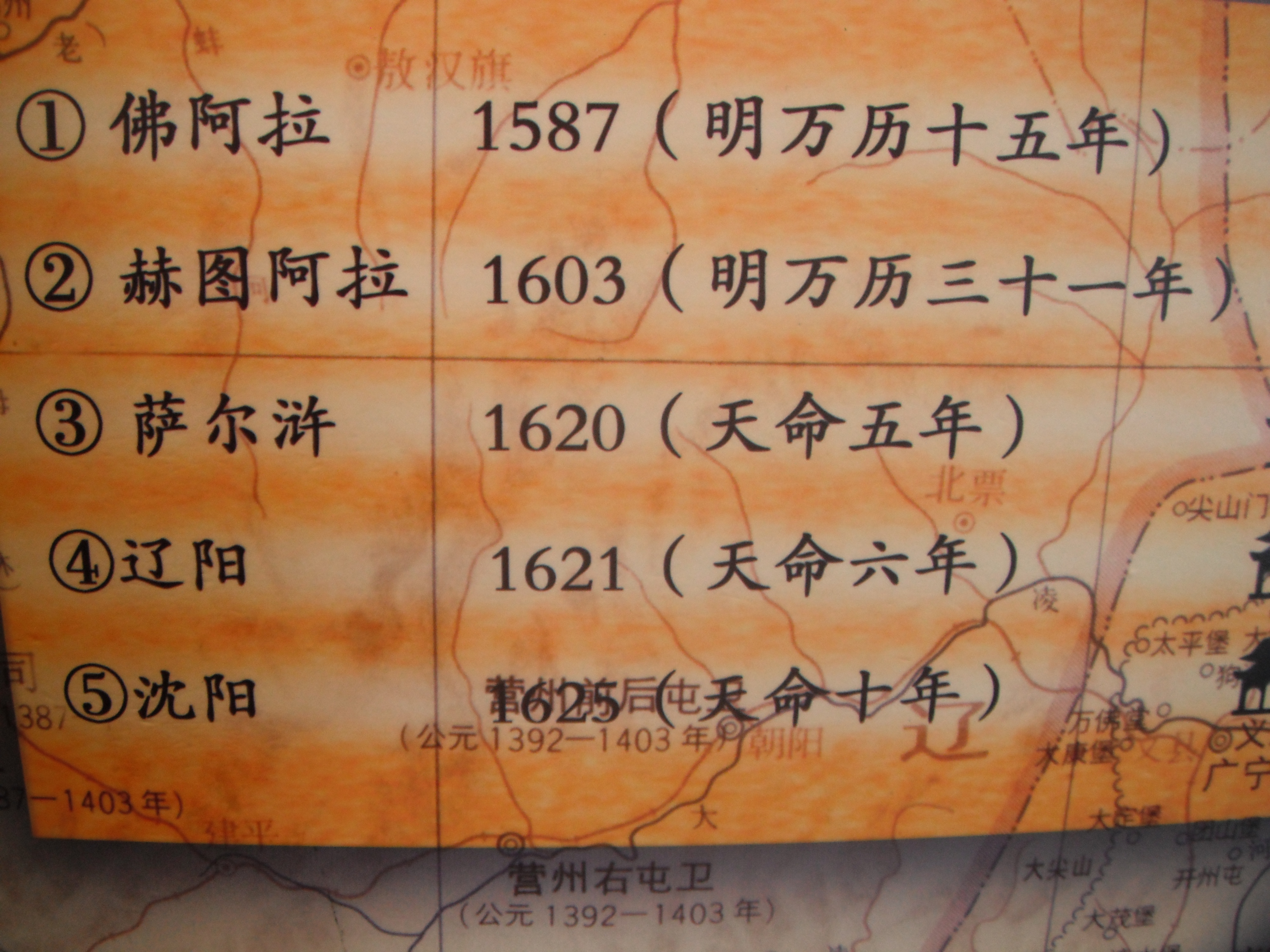 中文（中国大陆）: 后金首都